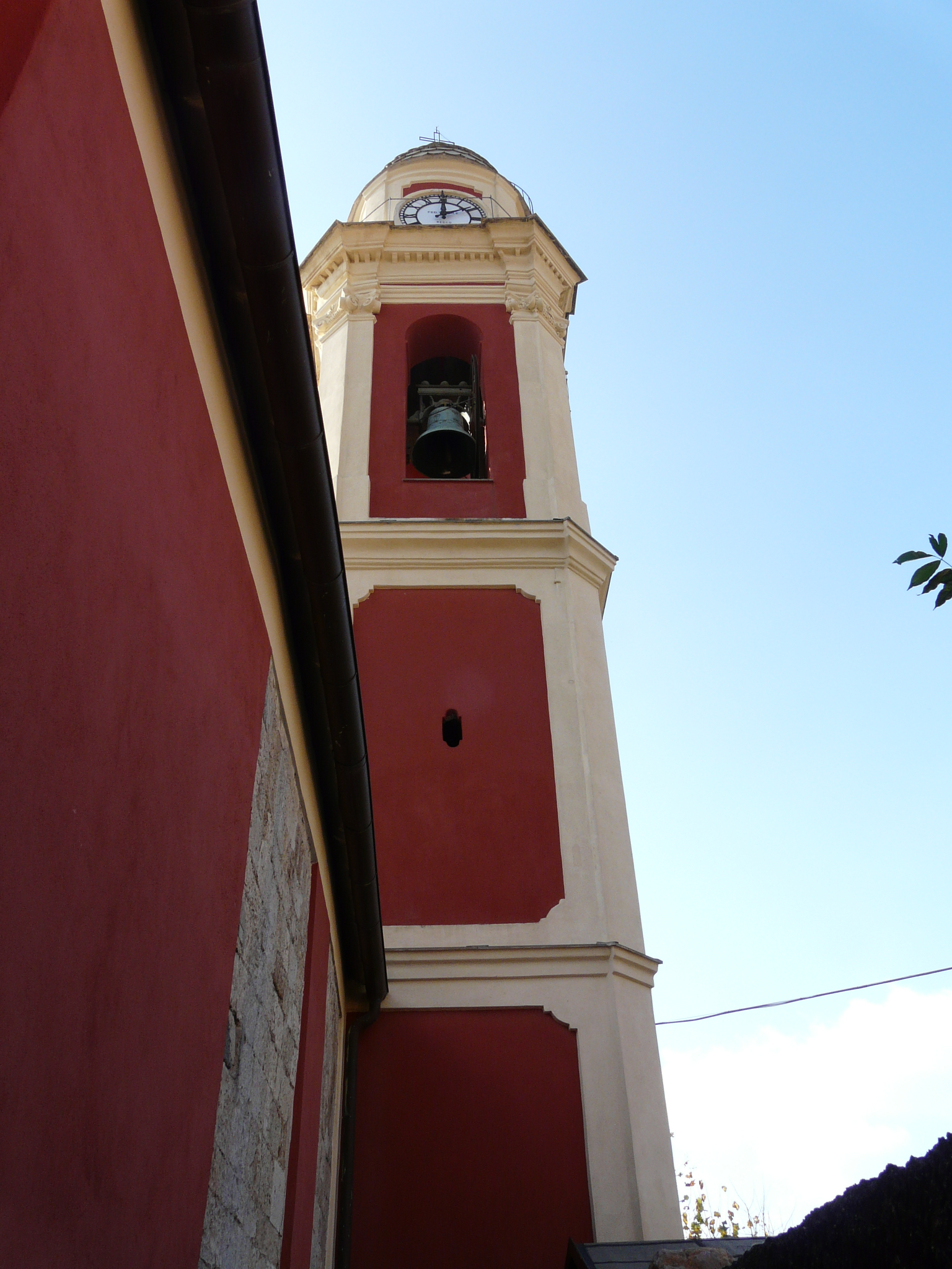 Chiesa di Santa Maria, Massasco, Casarza Ligure, Liguria, Italia